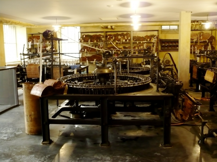 Métier de dentelle mécanique